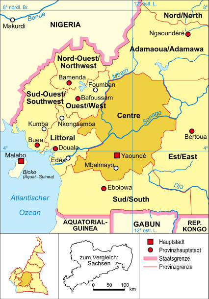 Yaoundé in der Provinz Centre, Kamerun (politische Karte)